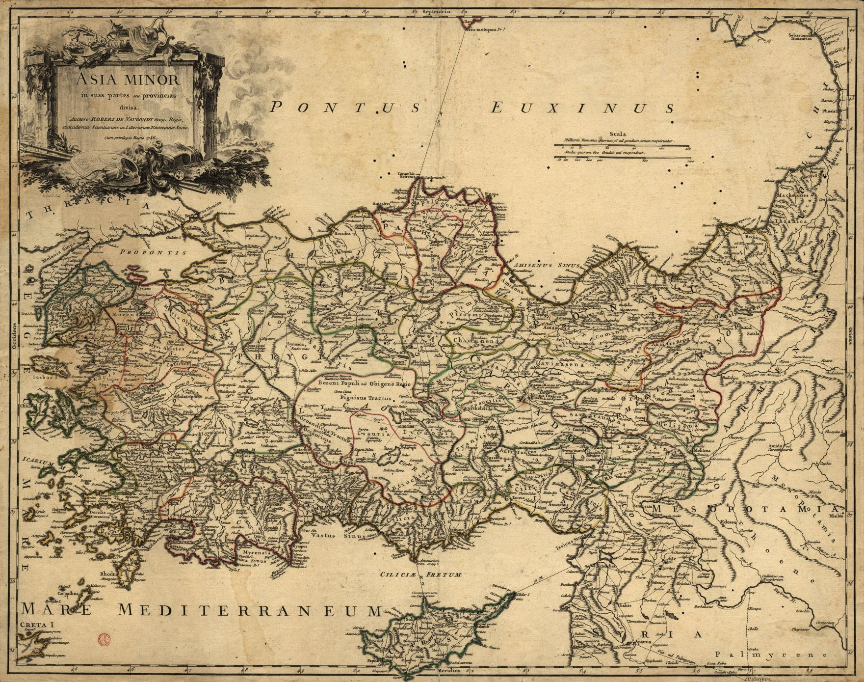 Didier Robert de Vaugondy (1723–1786), Asia Minor in suas partes seu provincias divisa, 1756 Date: 1756 Scale: ca. 1:2300000